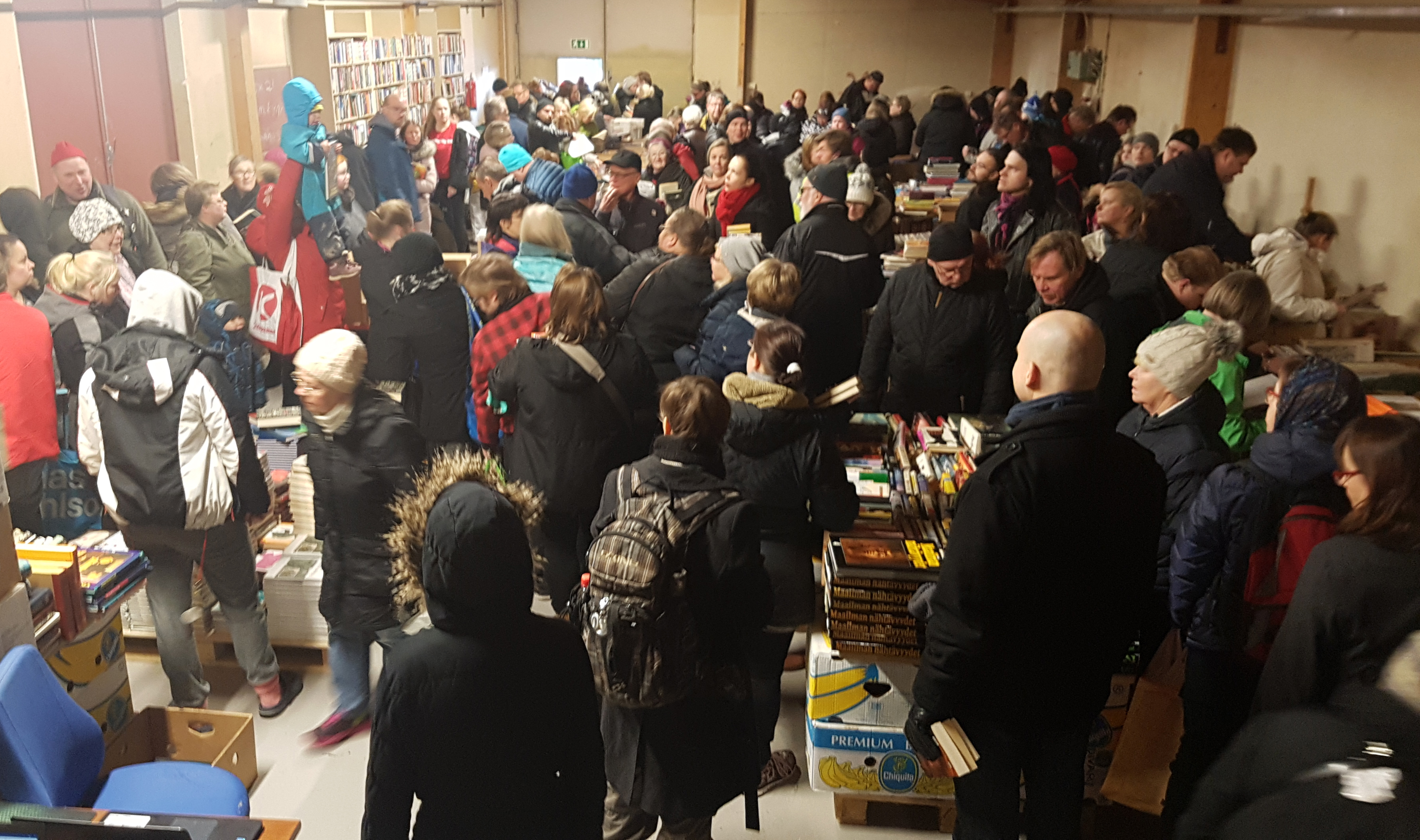 Väenpaljoutta Ilmaisen Kirjan Päivässä vuonna 2018